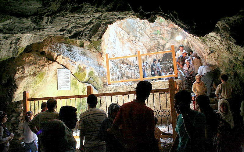 Eshab-ı Keyf (Yedi Uyurlar) Mağarası, Tarsus, Mersin